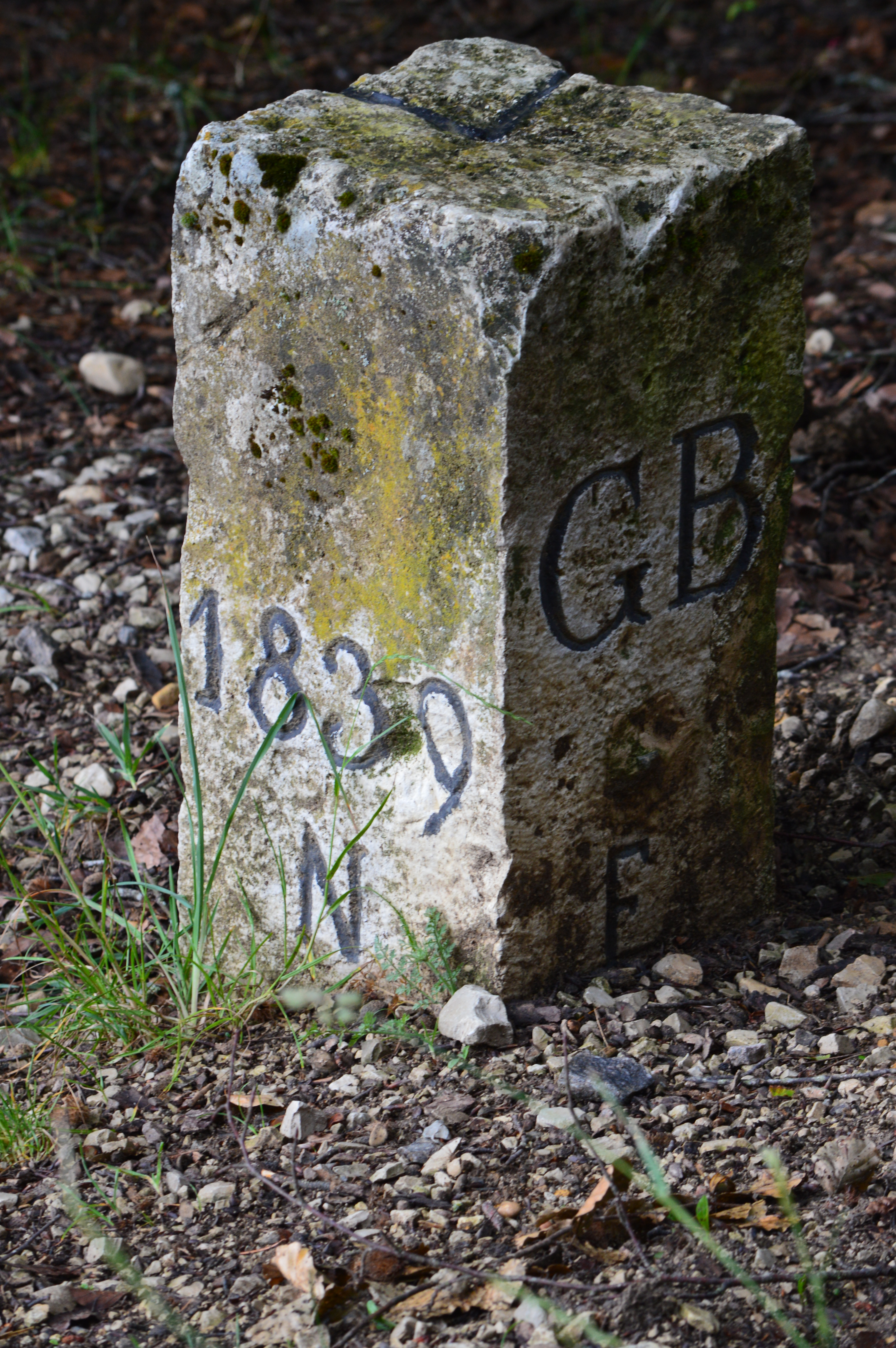 Gränzschtei am nördlichschte Pungt vo dè Schwiz, bim Schwarzè Schtei zwüschè Bargè SH un Blummbärg-Nordhaaldè.